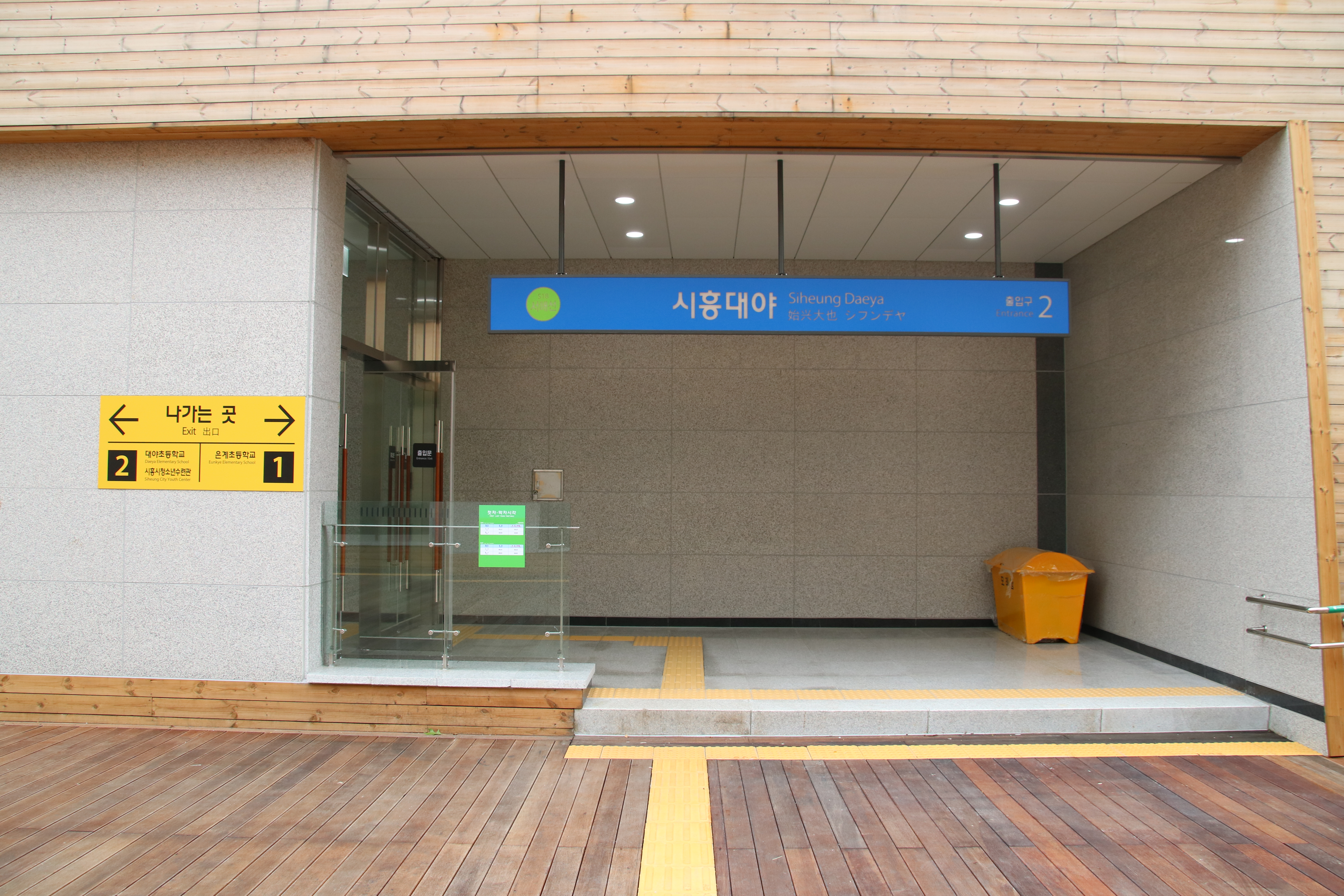 시흥대야역 2번 출입구